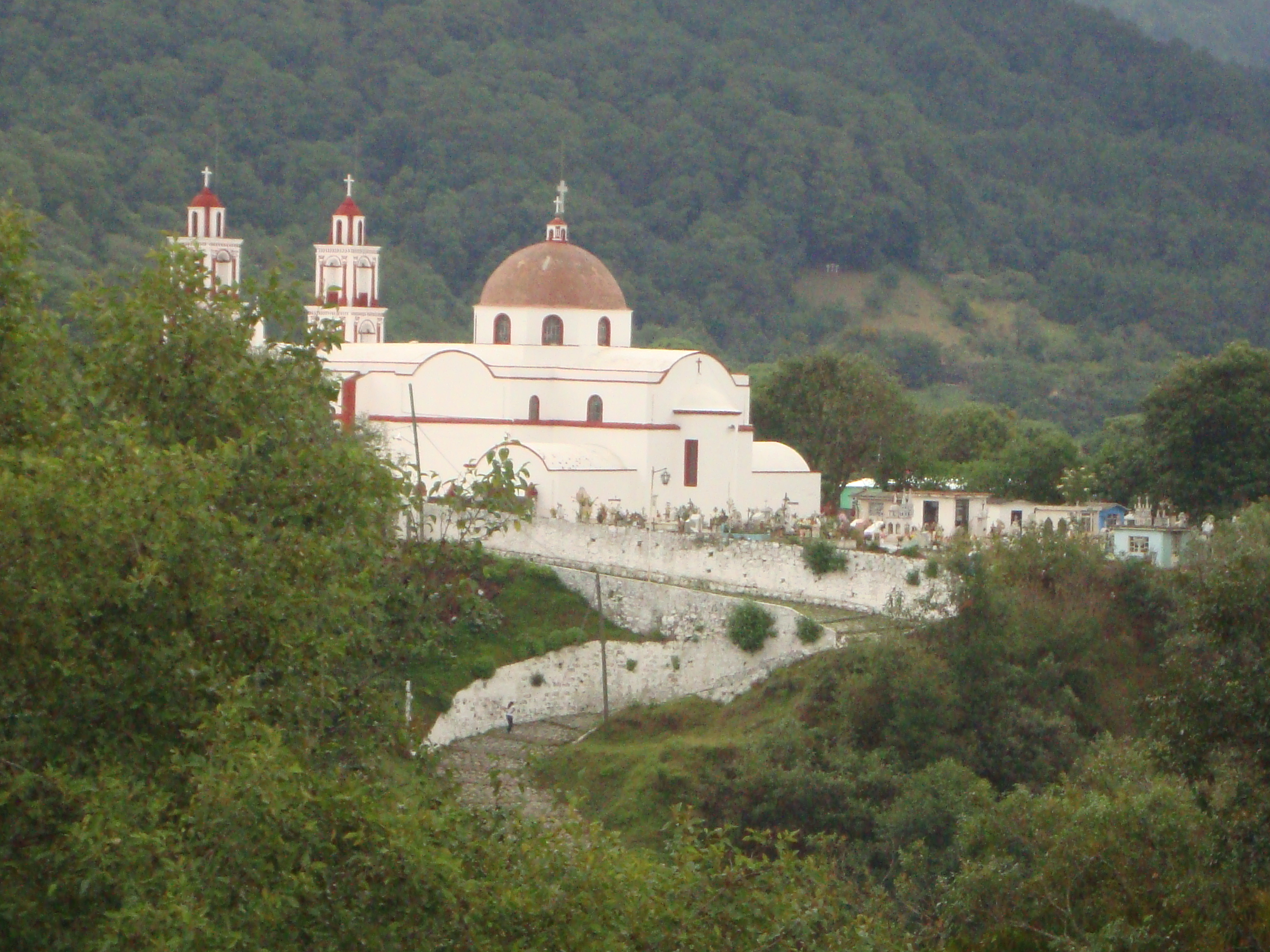 Casa del milagroso señor de Huaxtla, en Tlatlauquitepec